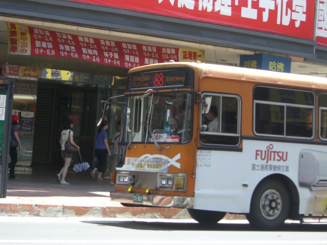 高雄市公共汽車管理處日野LRK2JMB大客車XA-960行駛高雄市公車建國幹線。